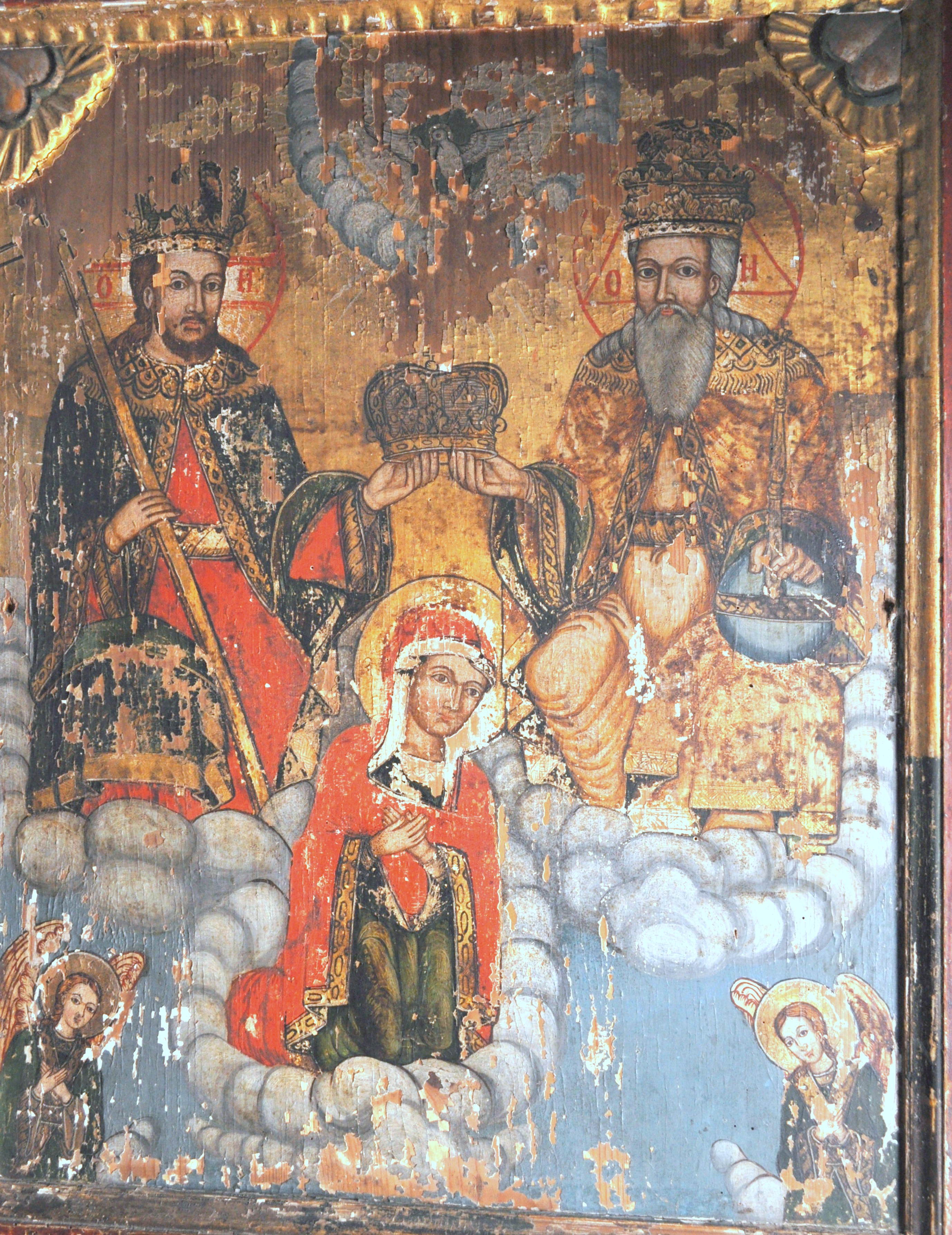 Biserica ortodoxă „Sfânta Treime”